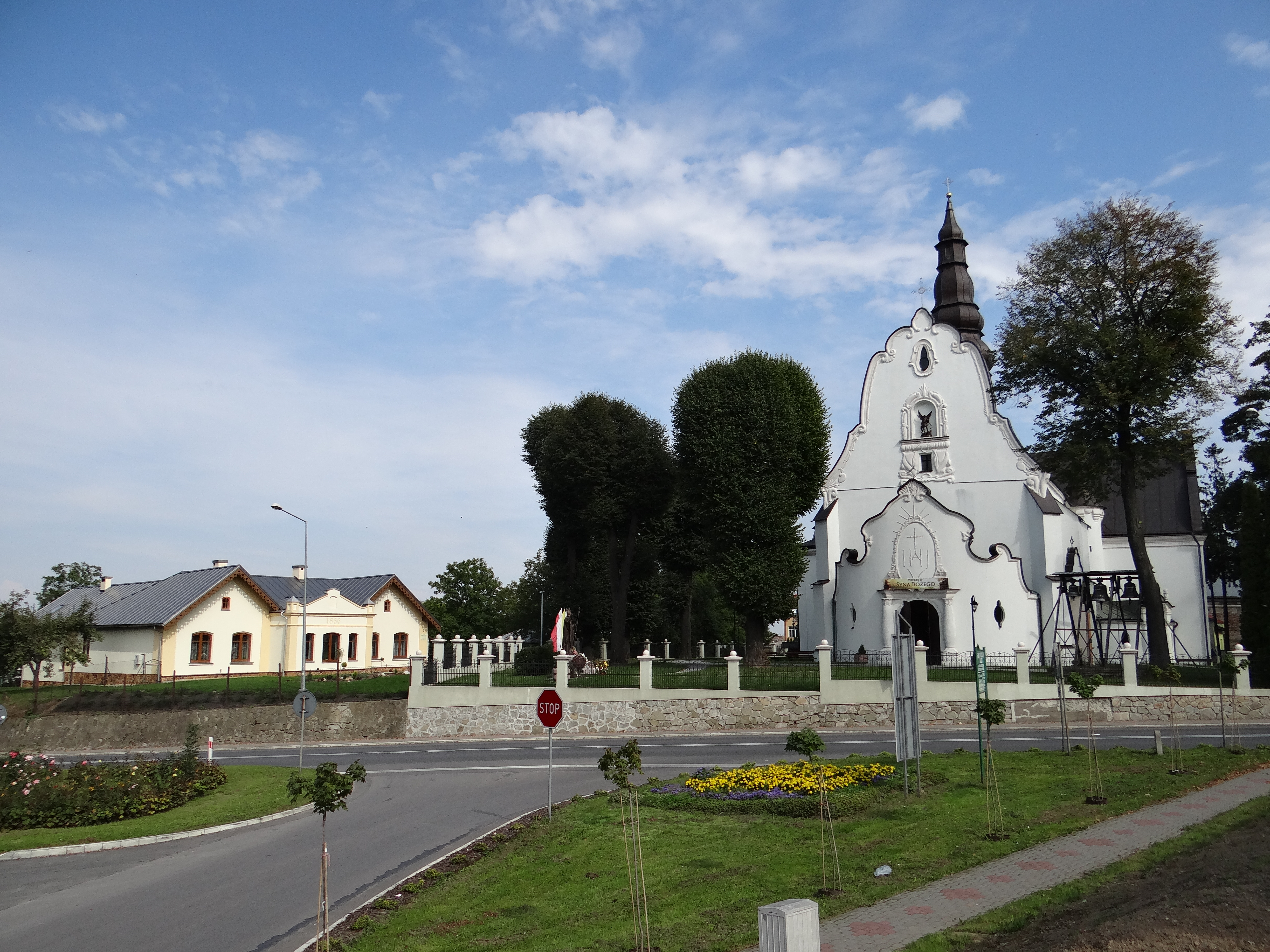 Kańczuga, zespół kościoła par. pw. św. Michała Archanioła